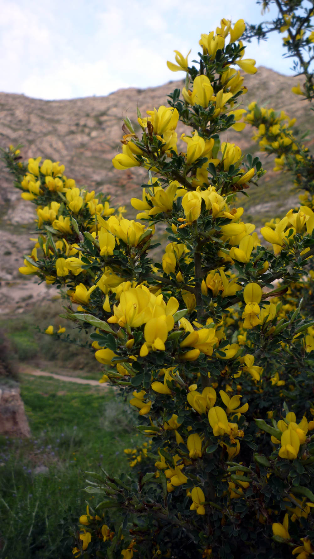 Calicotome infesta en El Portús (Parque natural de la Sierra de la Muela y Cabo Tiñoso) en Cartagena (Spain).